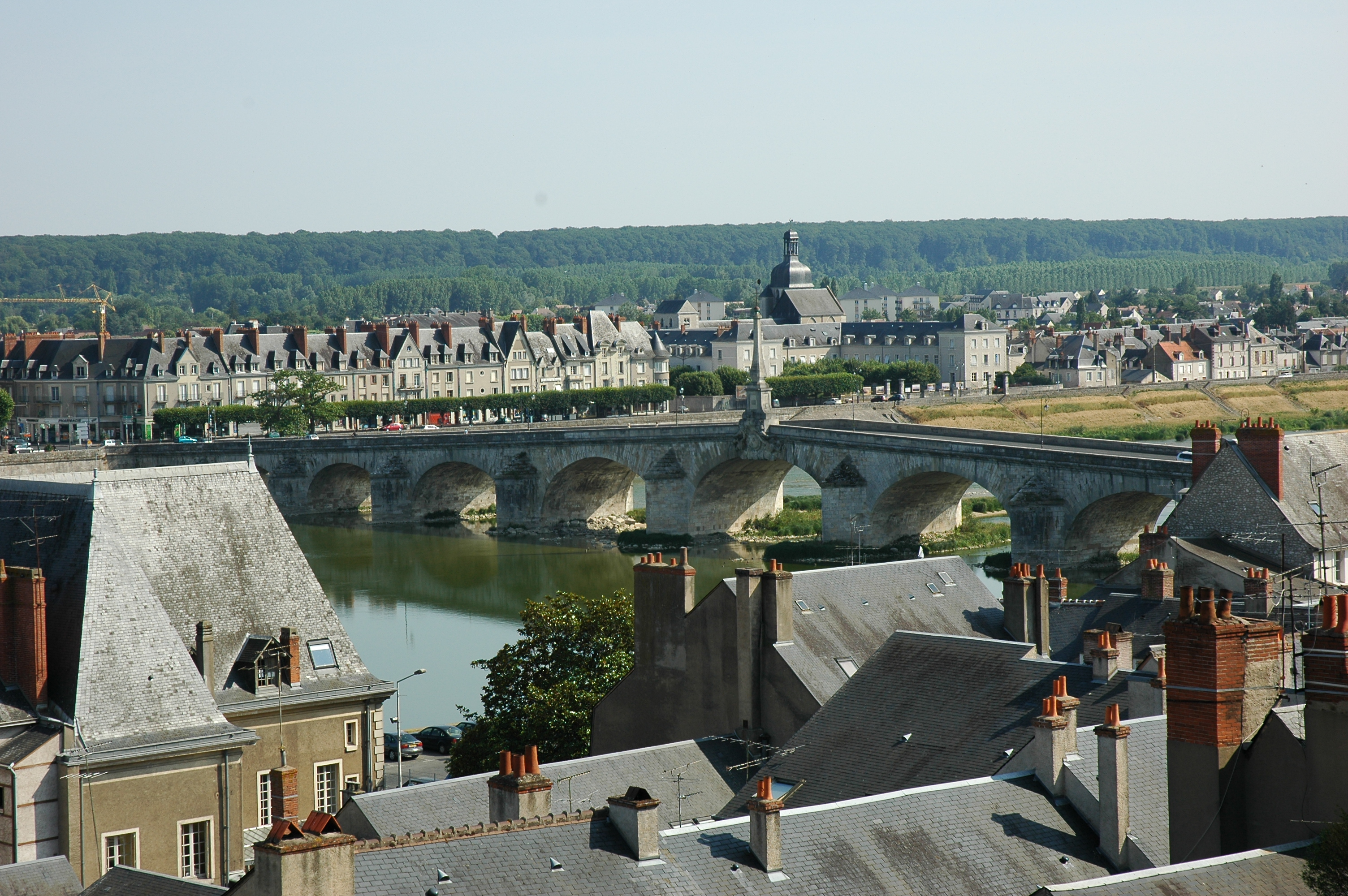 À Blois (Loir-et-Cher, France) : pont Jacques-Gabriel sur la Loire. En arrière-plan, l'église Saint-Saturnin.